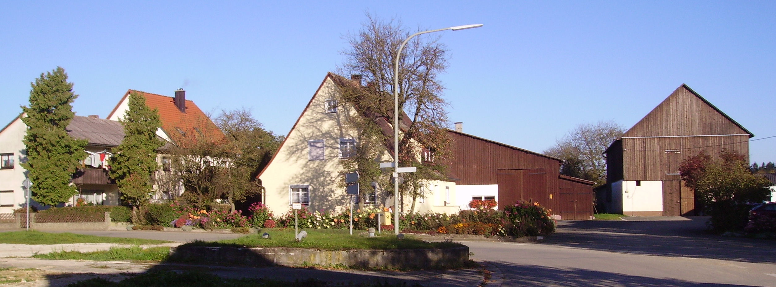 view of Neudorf, part of Heiligenstadt in Oberfranken in Upper Franconia, Germany